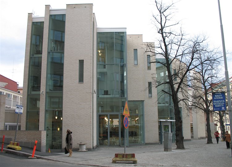 Kulttuuritalo Sandels Helsingin Töölössä. Huom: Muista säilyttää viittaus kuvaajaan, mikäli käytät kuvaa.